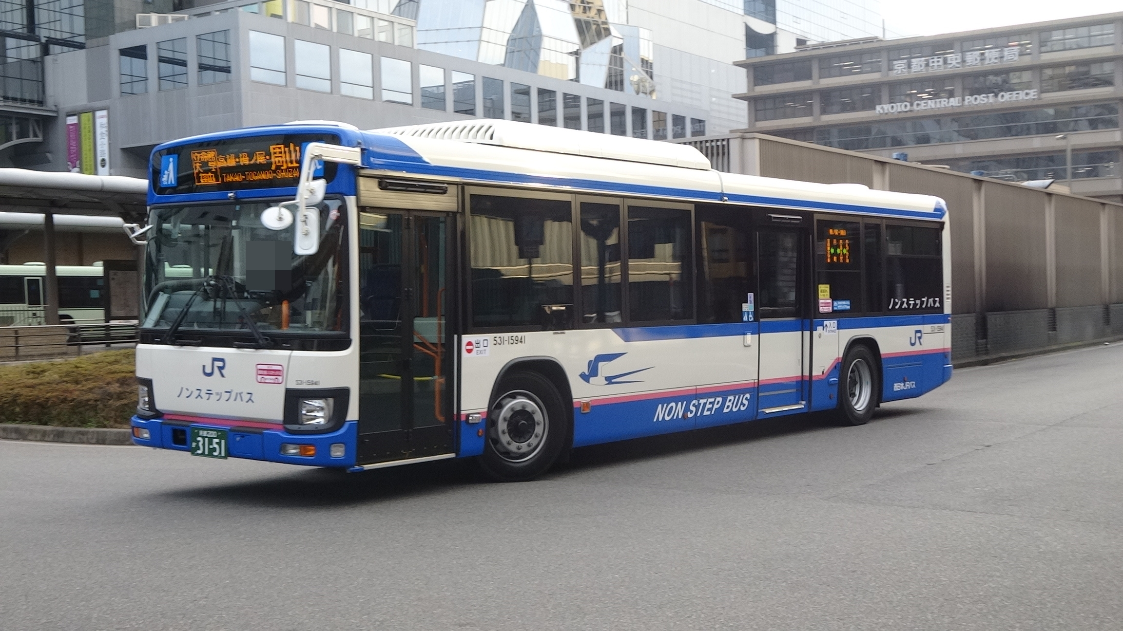 2016年1月8日(金)撮影